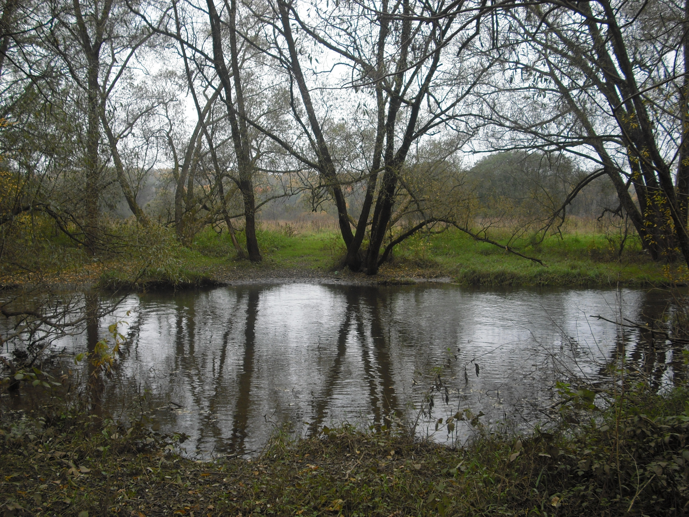 Река Сходня около деревни Путилково